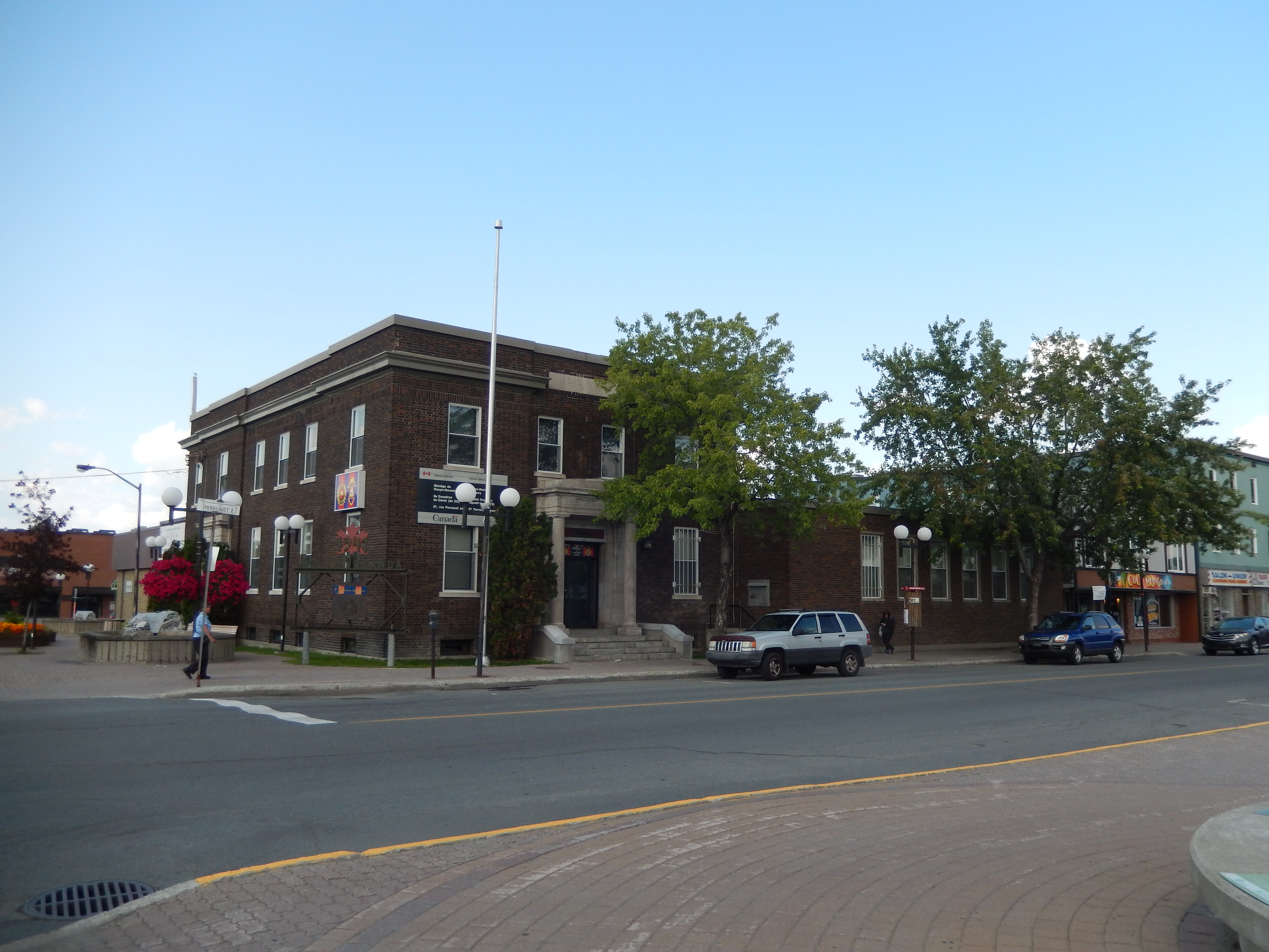 Édifice fédéral, 97, rue Perreault est, Rouyn-Noranda (Canada). (Protection ÉFP reconnu. Voir la liste des lieux patrimoniaux de l'Abitibi-Témiscamingue pour plus de détails).